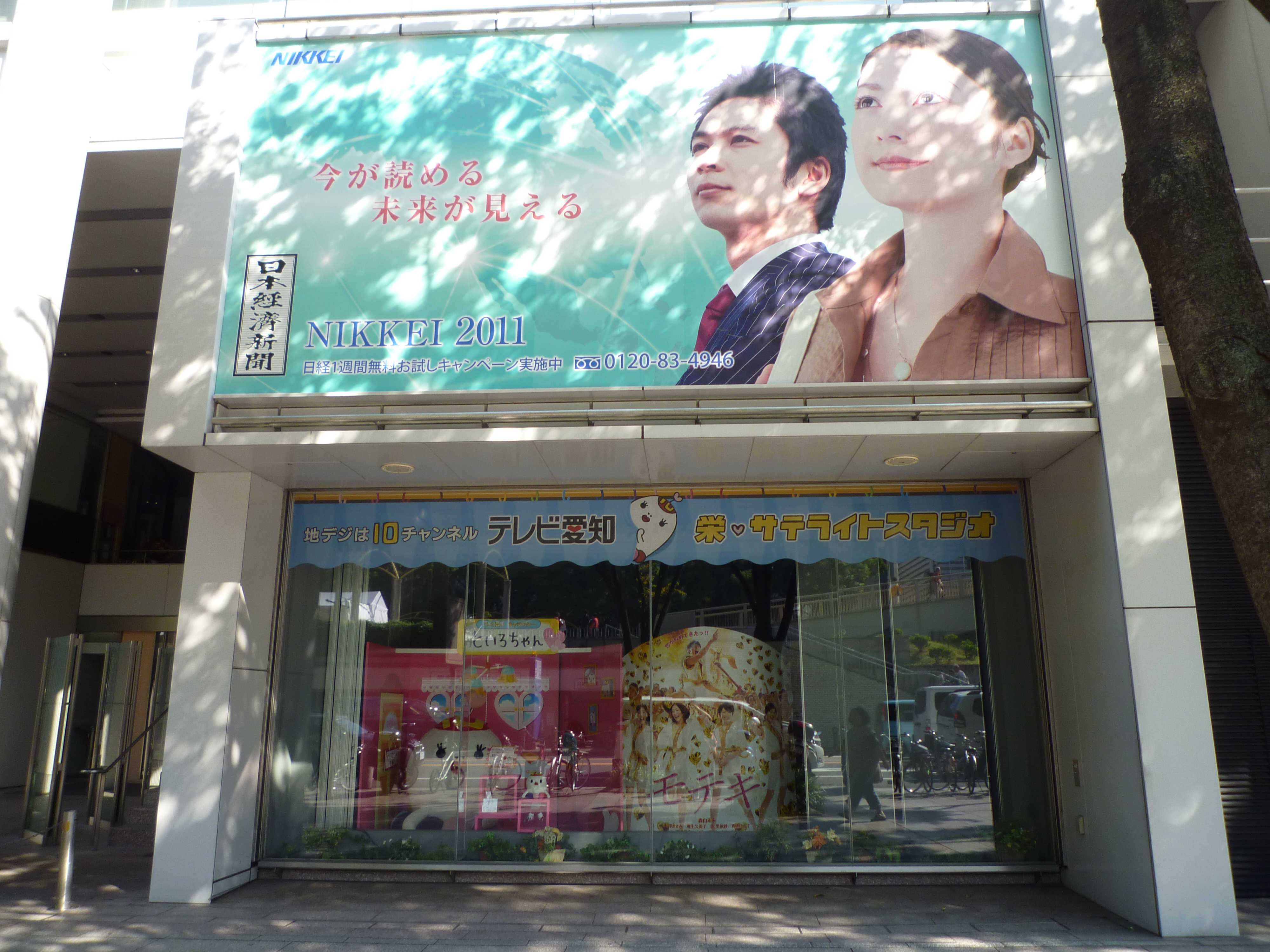 日本経済新聞社名古屋支社ビル1Fにあるテレビ愛知栄サテライトスタジオ（現在は使用されていない）